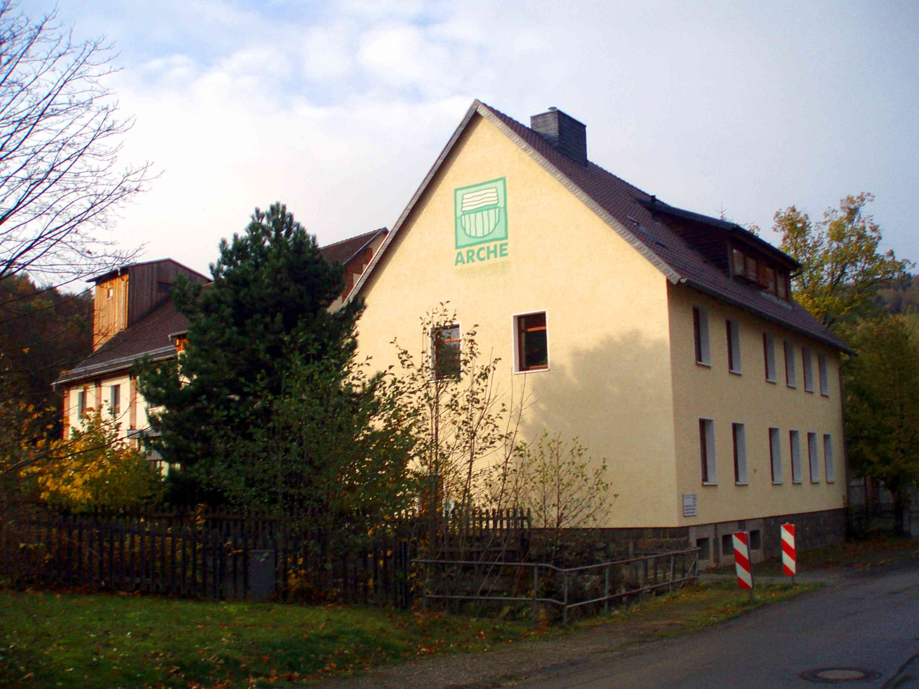 Standort des früheren Blaufarbenwerks Hasserode